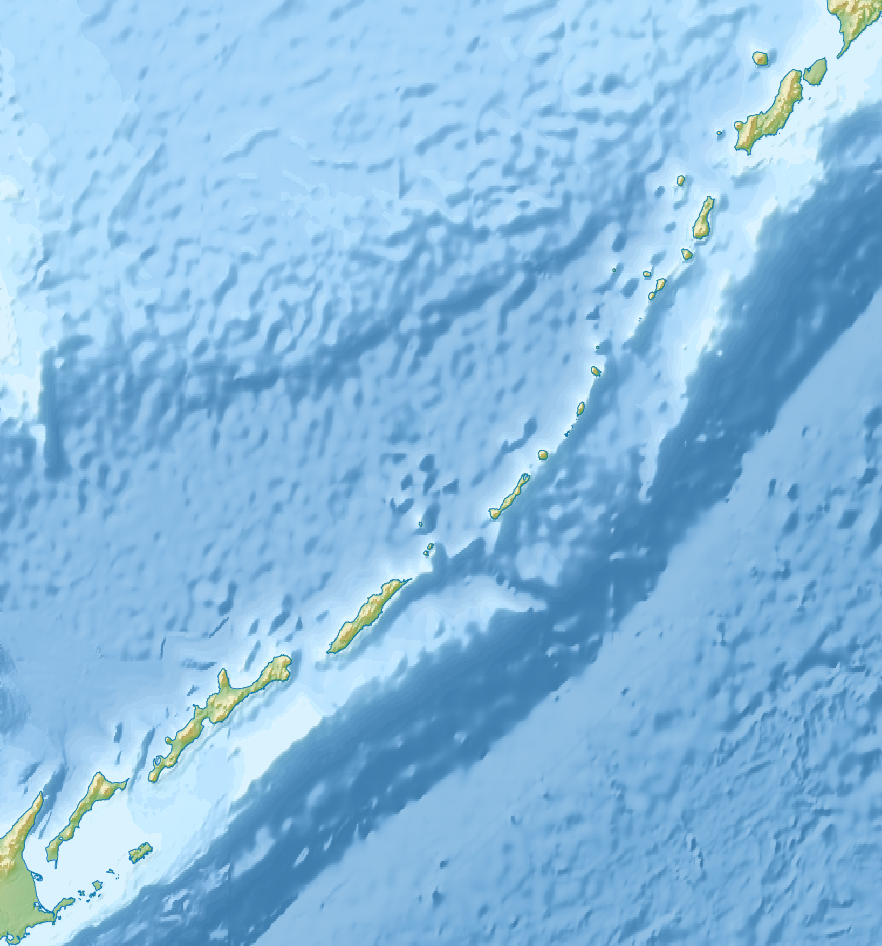 Курильские острова -- физическая карта. Проекция: Меркатор Границы карты: N: 51.3837° N S: 42.9694° N W: 144.7492° E E: 157.3007° E Координаты для GMT: -R144.7492/157.3007/42.9694/51.3837